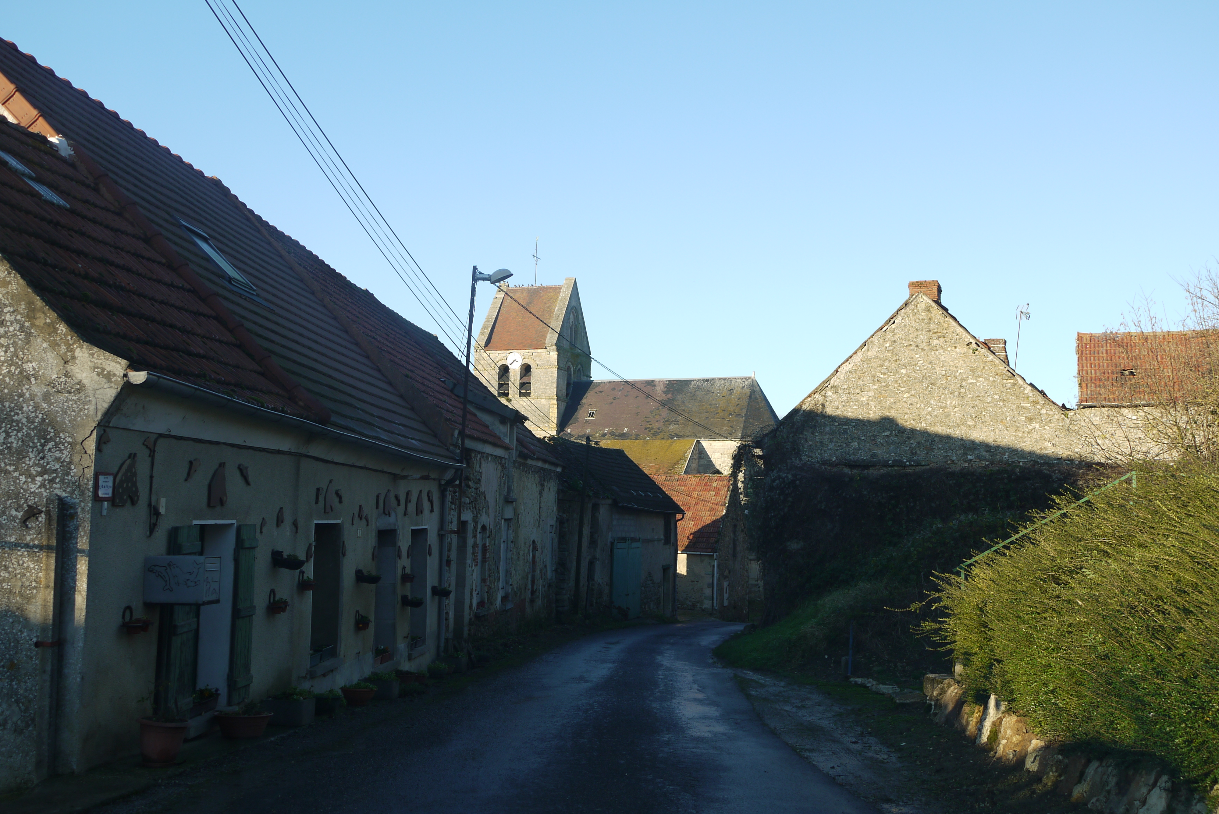 Coulonges-Cohan. Vers l'église de Coulonges.